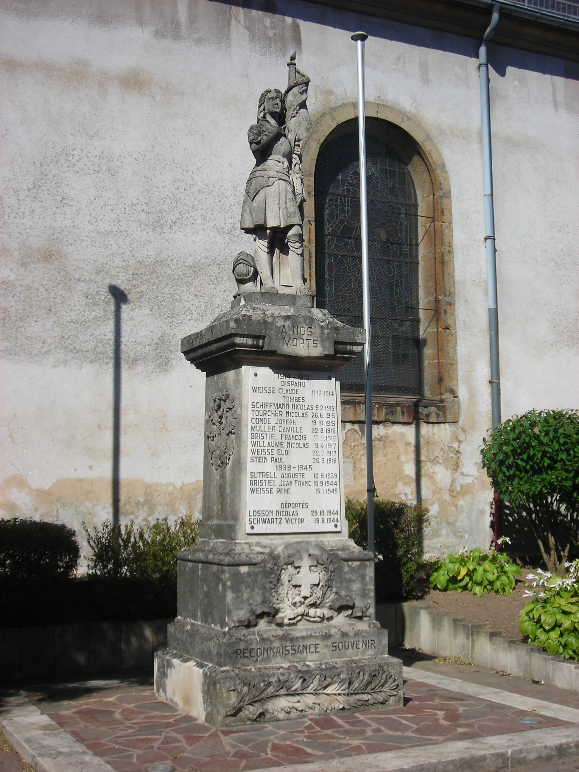 Monument aux morts de Boucheporn (Moselle, France)